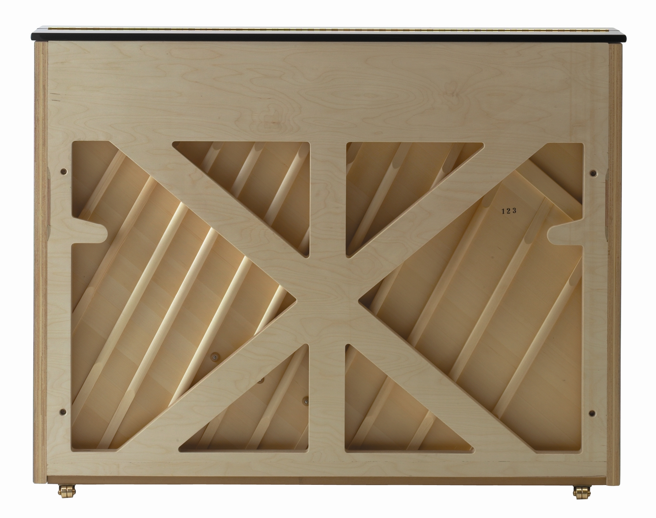 Rückansicht eines G-S Klaviers